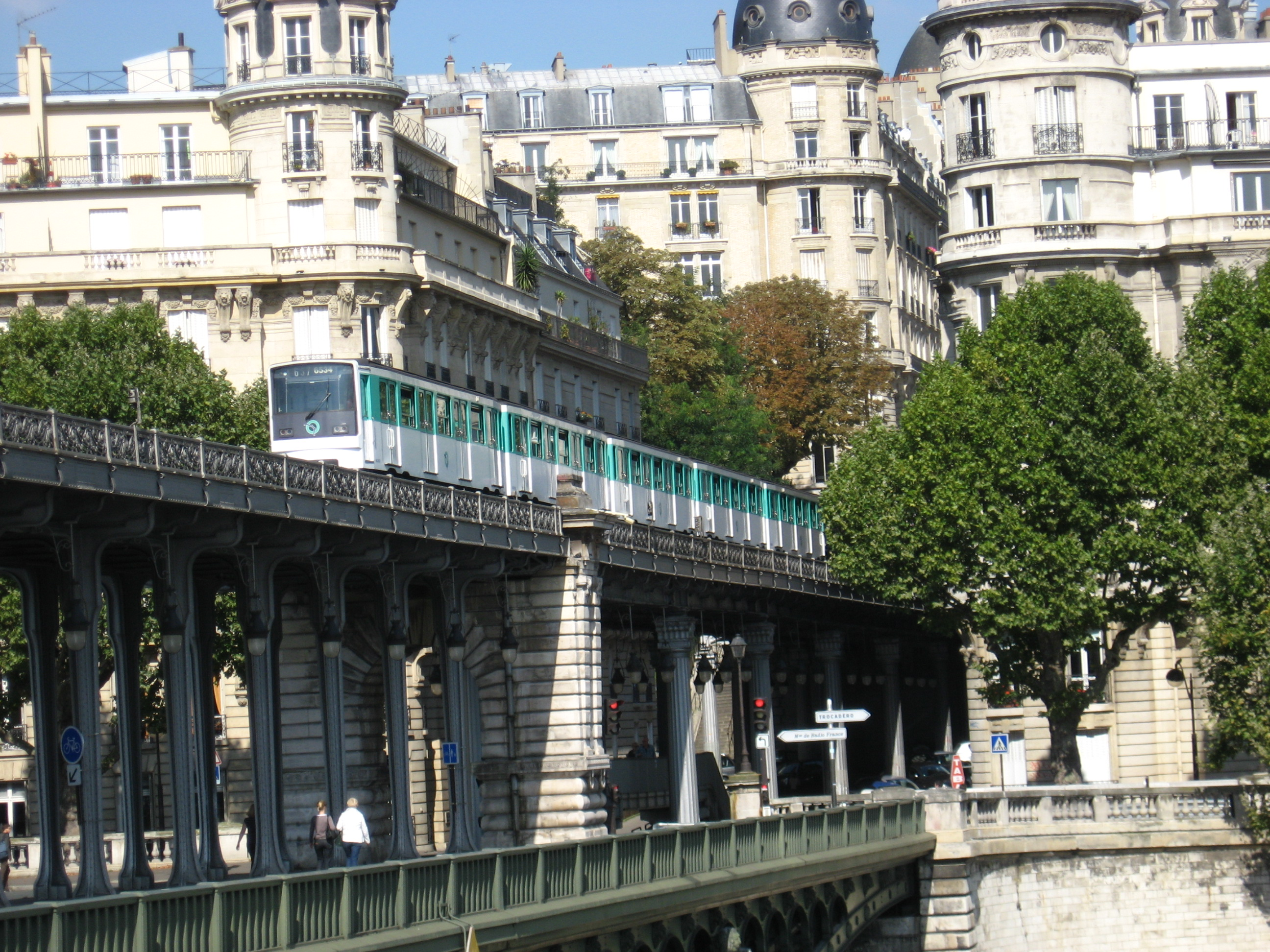 De Parijse metro in 2008